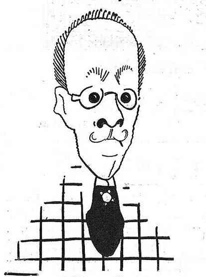 El Gay Saber. Galería cómica dels Mestres vius.